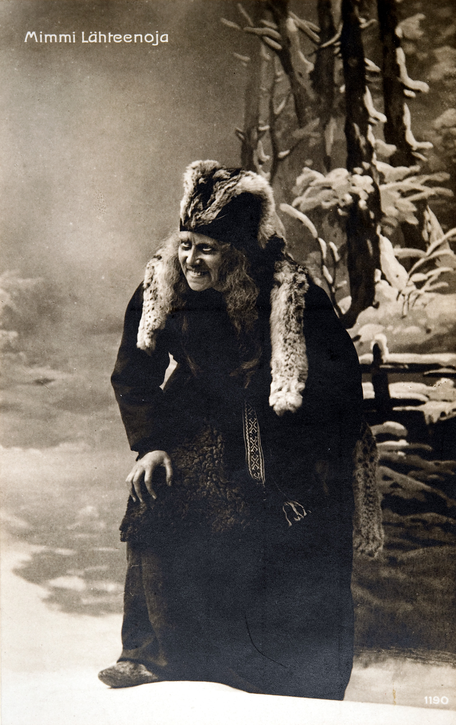 Mimmi Lähteenoja Louhen roolissa Kansallisteatterin Pohjolan häät vihkiäisnäytöksessä 9.4.1902